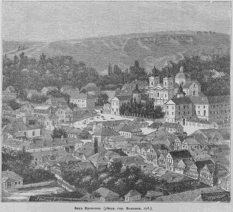 Місто Кременець у 2 половині 19 століття